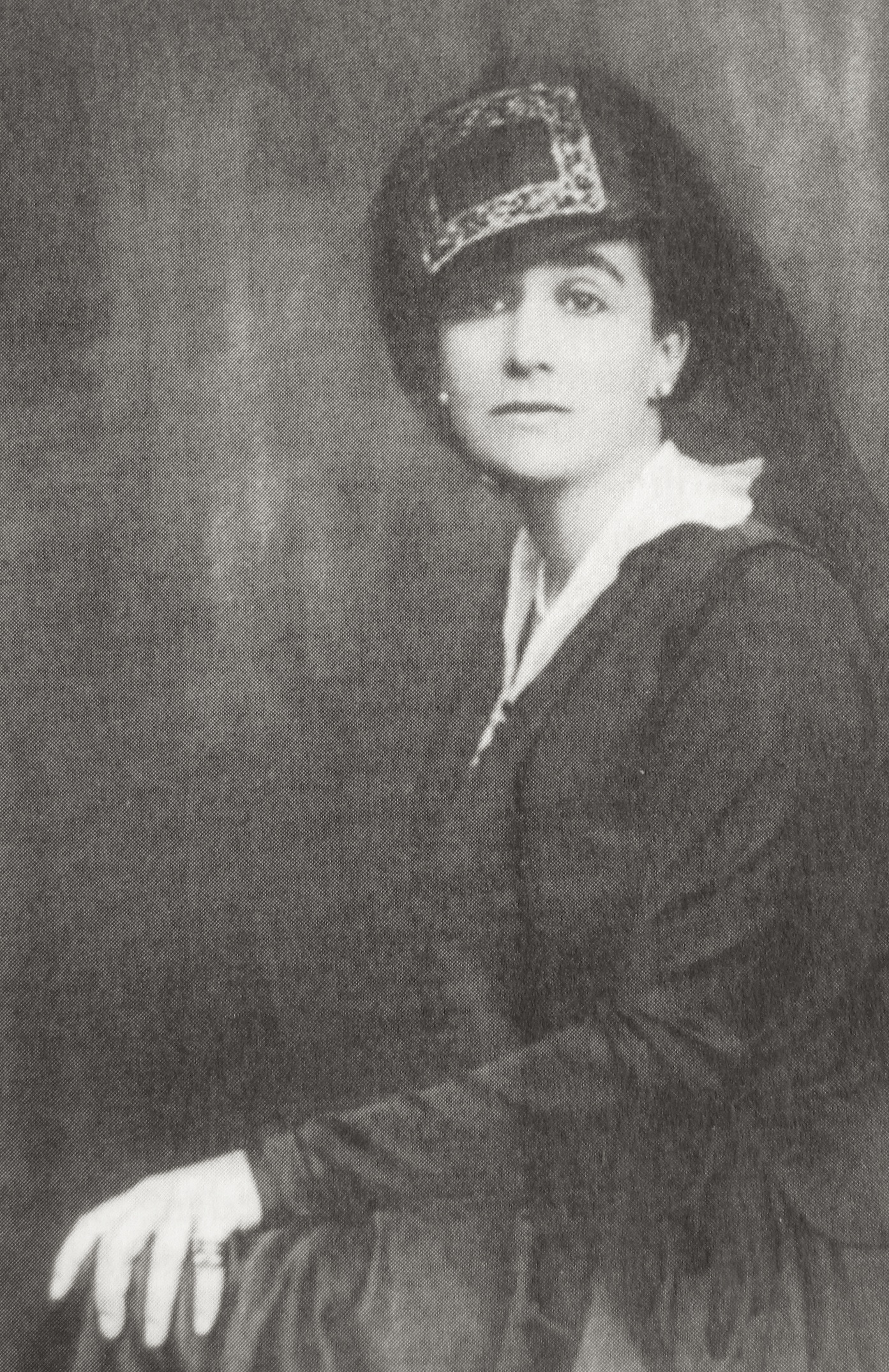 Maria Carmi um 1905